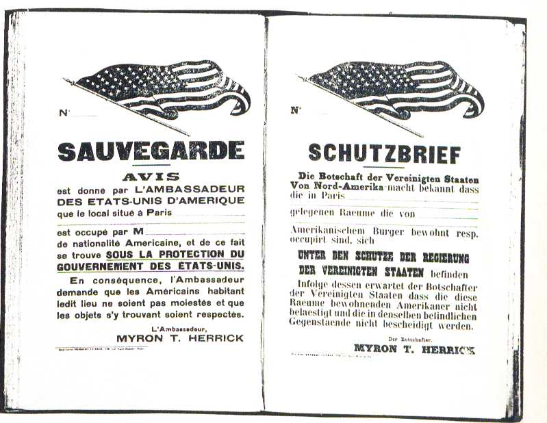 Myron T. Herrick Sauvegard Schutzbrief Paris 1914